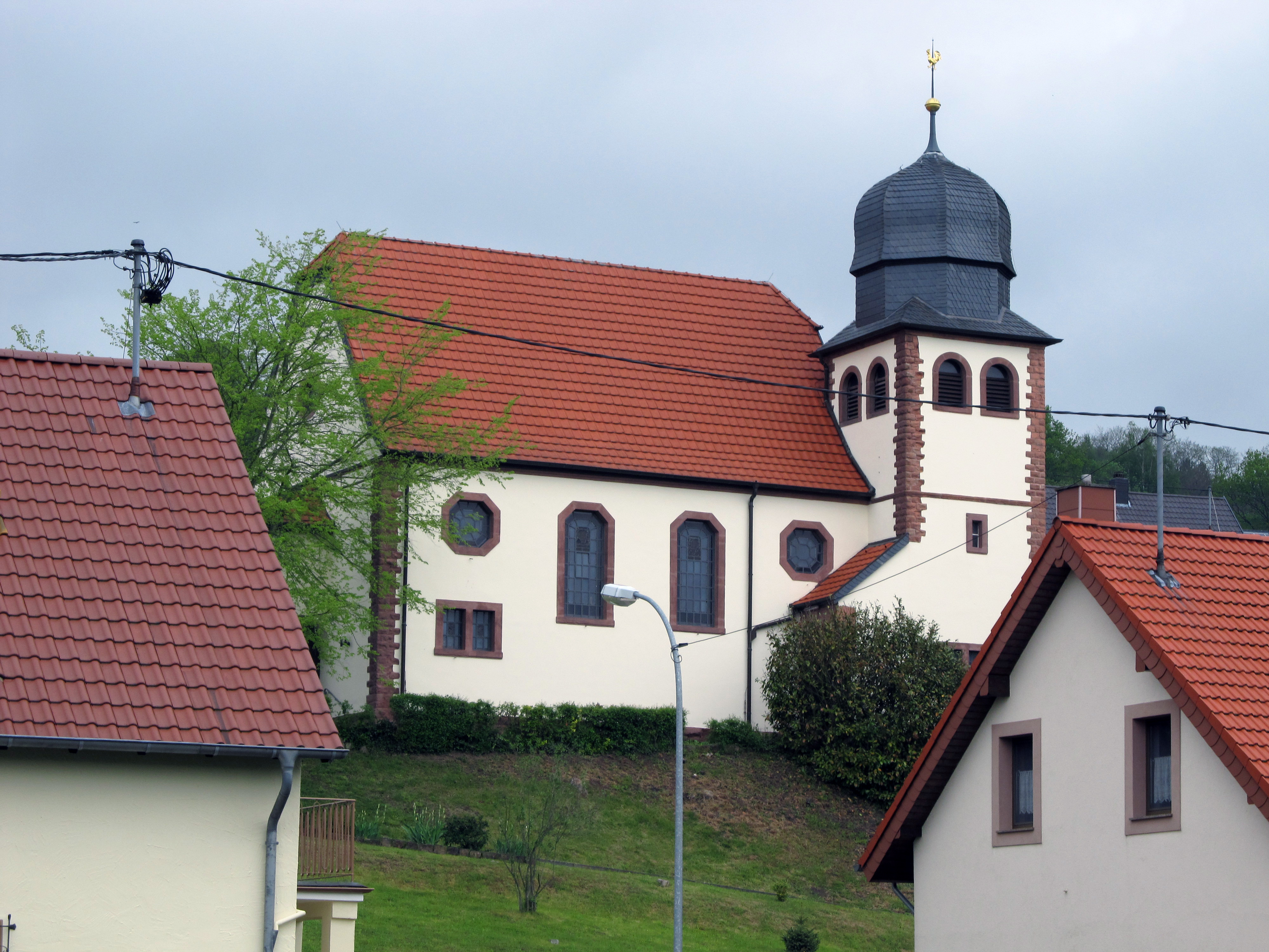 Protestantische Kirche in Bierbach